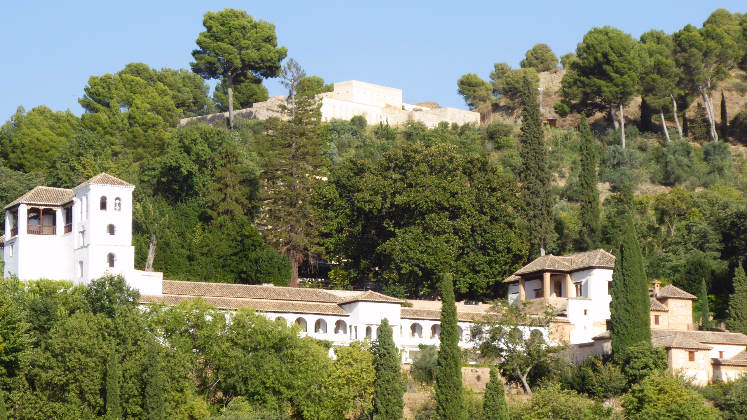 Alhambra: die Gärten Generalife und oberhalb die Wehranlage Castillo Silla del Moro auf dem al-Sabika-Hügel der Alhambra in Granada, Andalusien, Spanien Foto Wolfgang Pehlemann P1100743